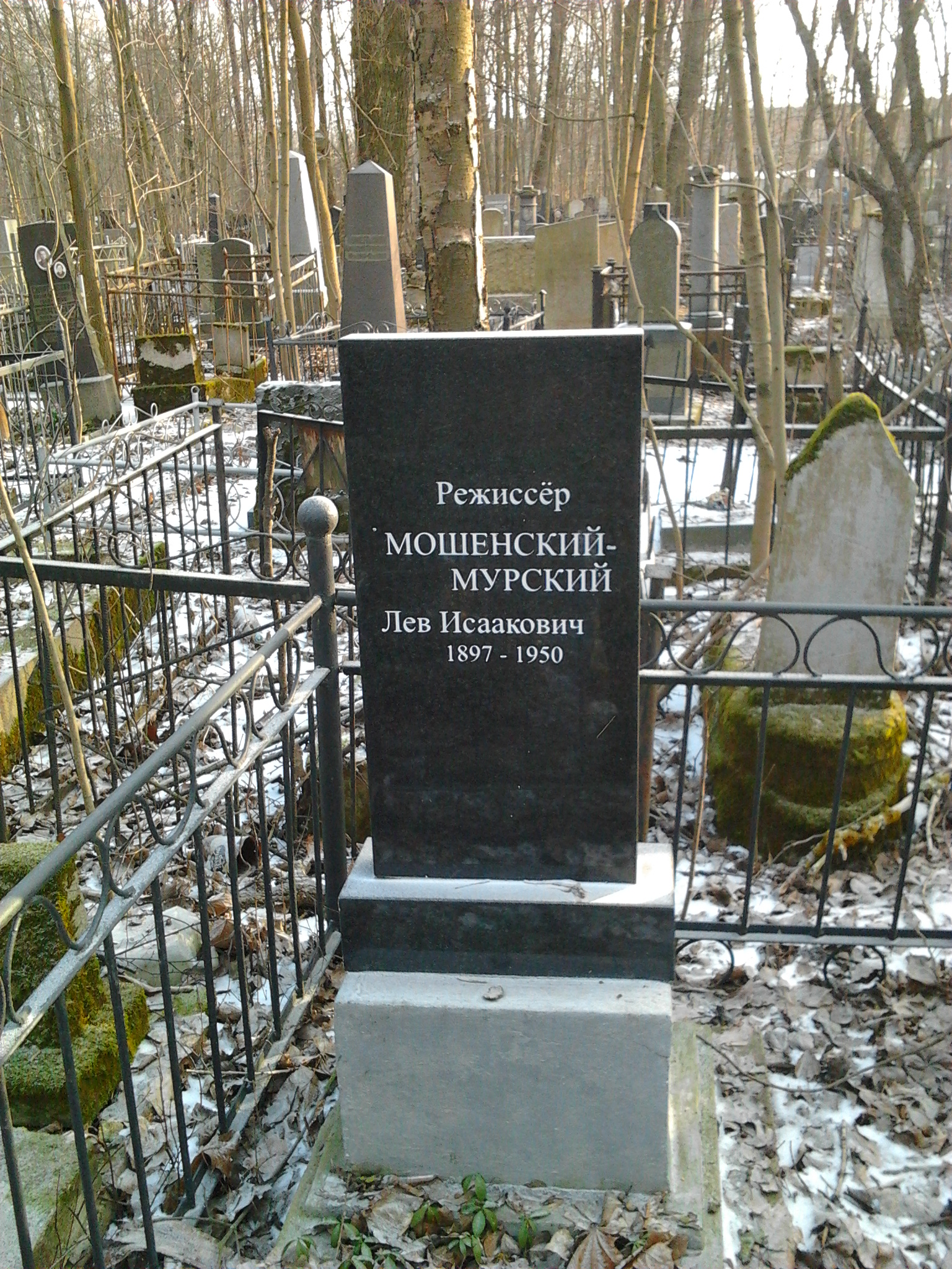 Могила Л. И. Мошенского-Мурского на Еврейском (Преображенском) кладбище Санкт-Петербурга.